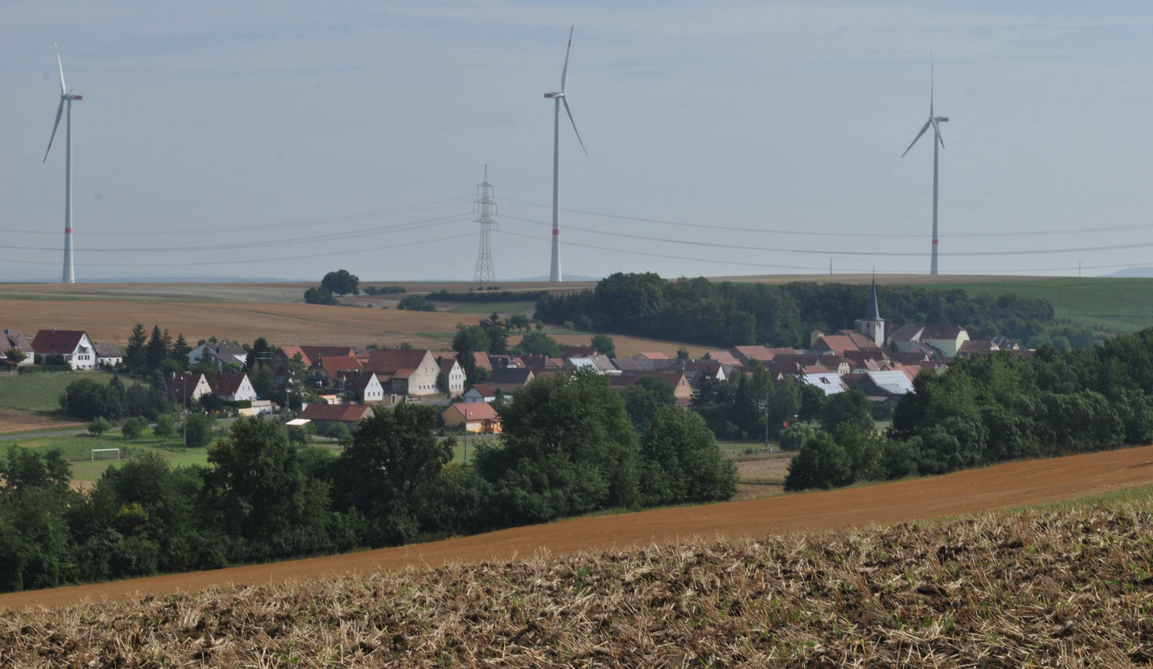 Volkach-Krautheim, von Südwesten